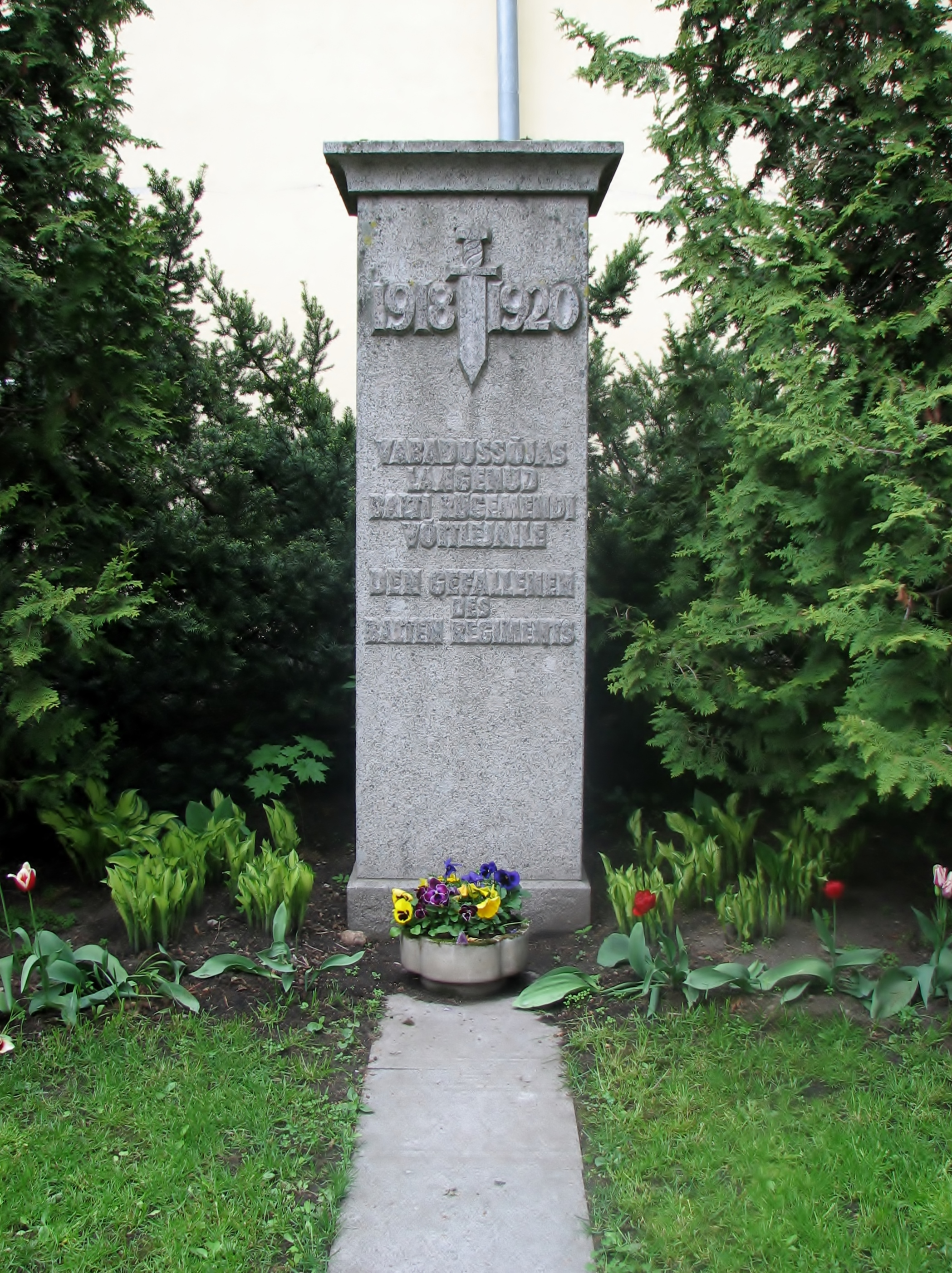 Vabadussõjas võidelnud Balti pataljoni (Balten Regiment) mälestussammas Kohtu 6, Tallinn